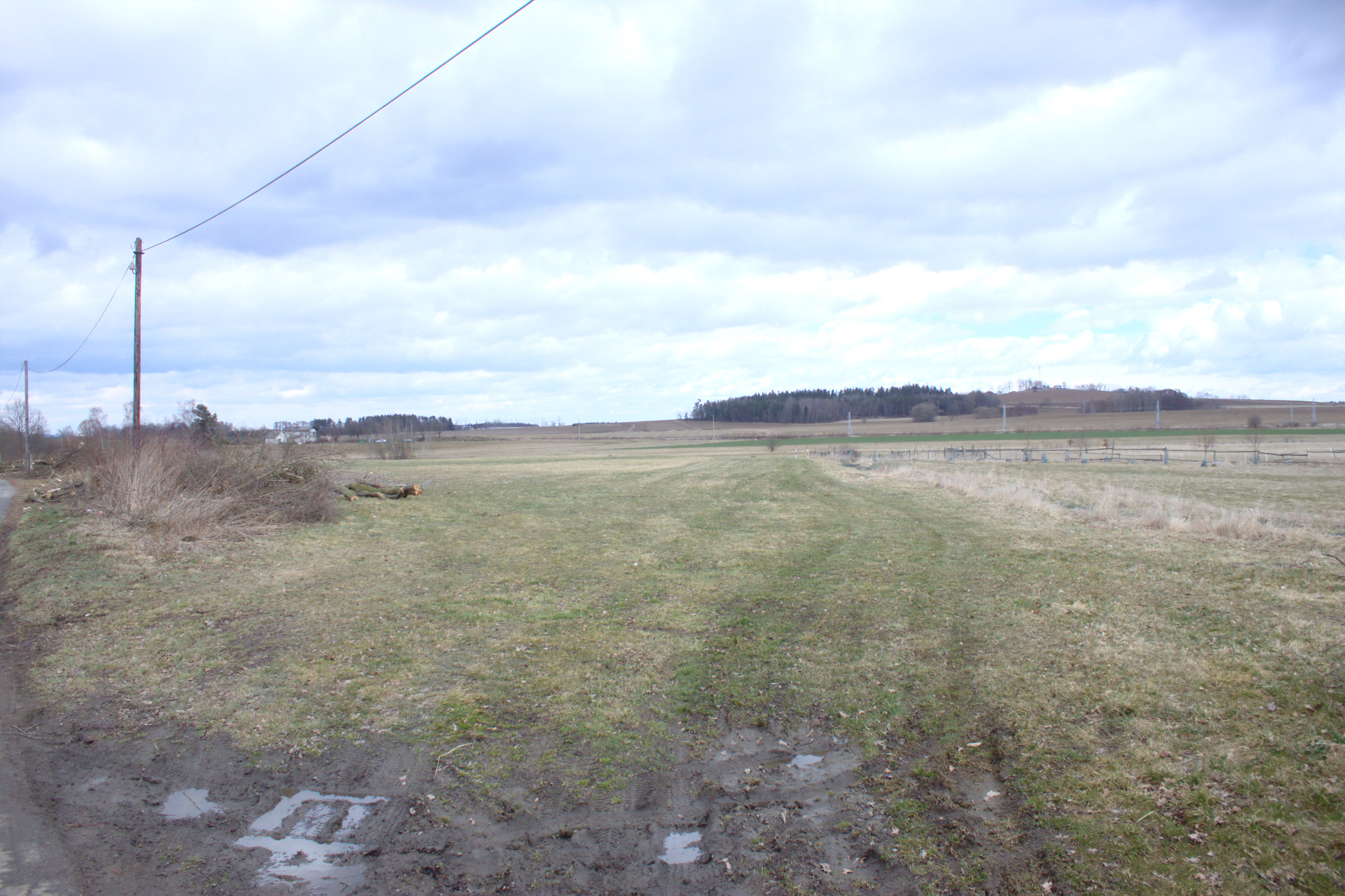 Prostor budoucí dálnice D3 ve vesnici Dolní Svince Project: Fotíme Česko